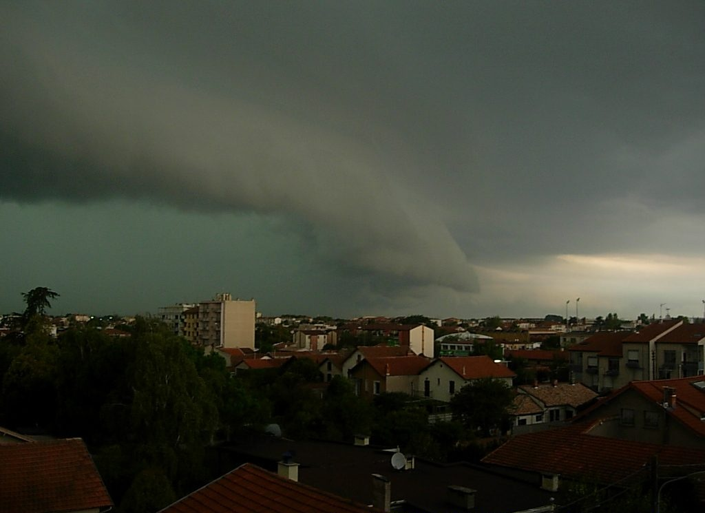 Arcus pris à Toulouse lors de l'alerte Orange qui a touchée la Haute-Garonne le 17 Septembre 2007.